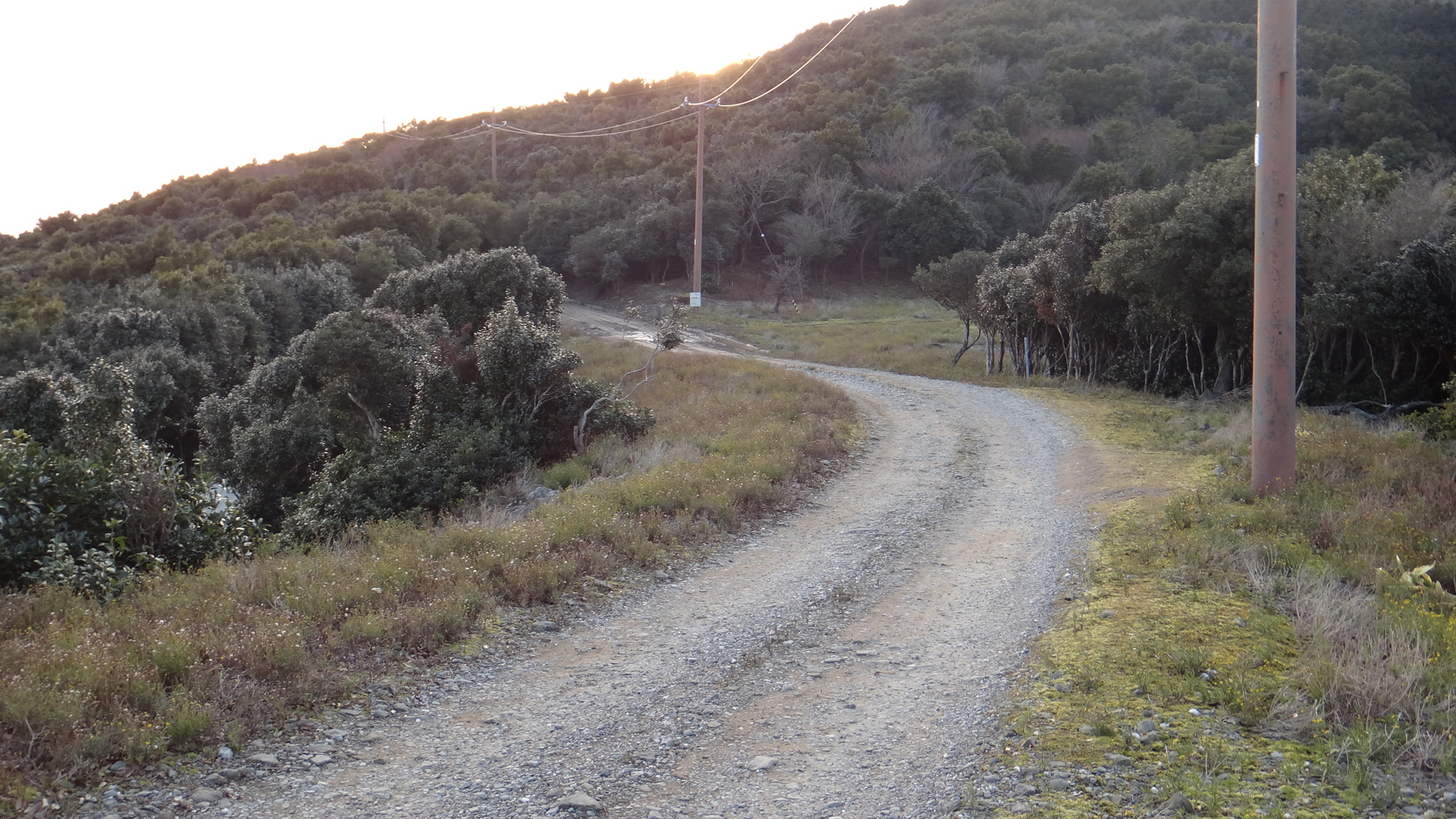 上田林道の未舗装区間